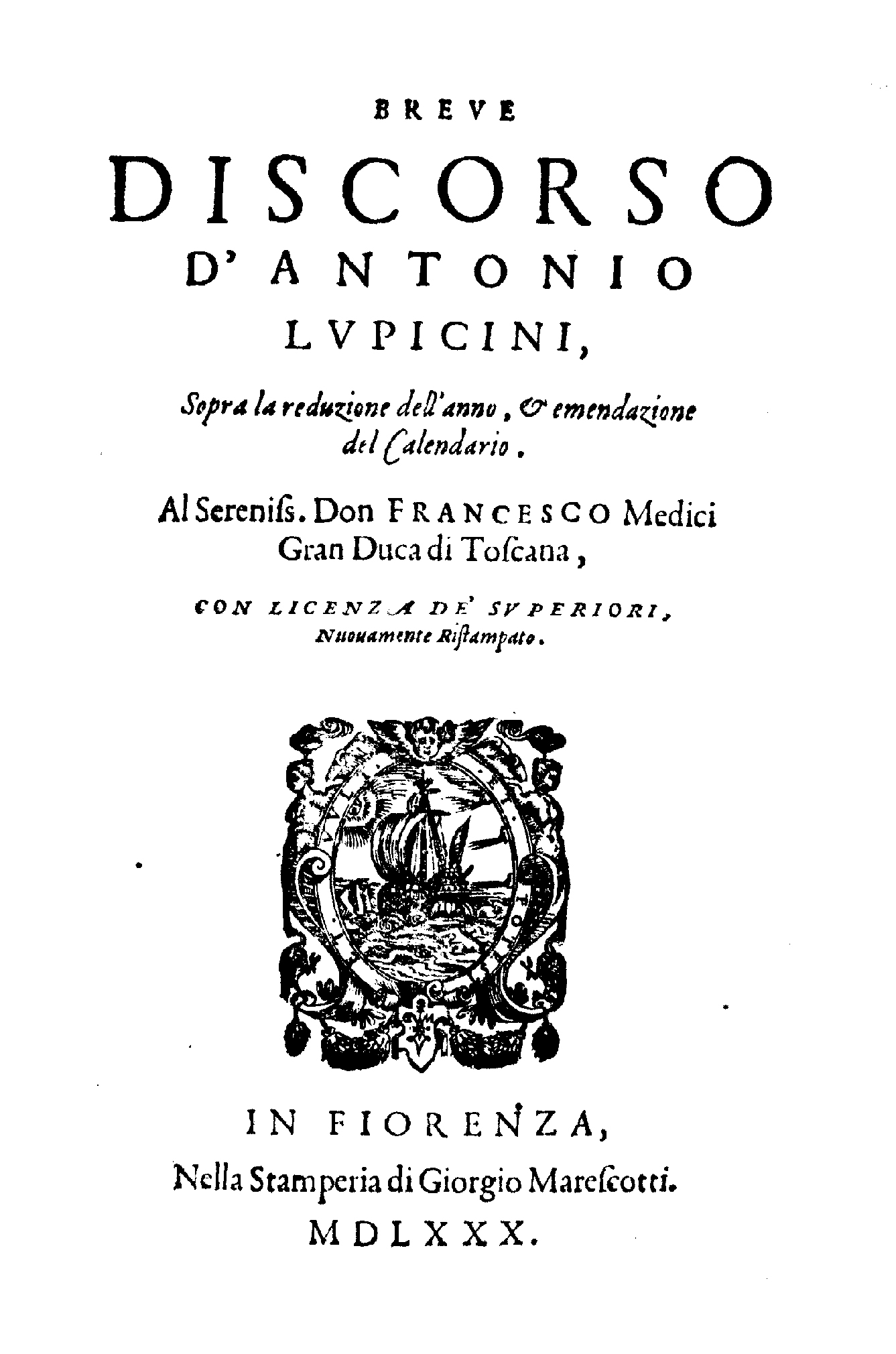 Breue discorso d'Antonio Lupicini, sopra la reduzione dell'anno, & emendazione del calendario. .... - In Fiorenza : nella stamperia di Giorgio Marescotti, 1580. - [8] c. ; 4º .